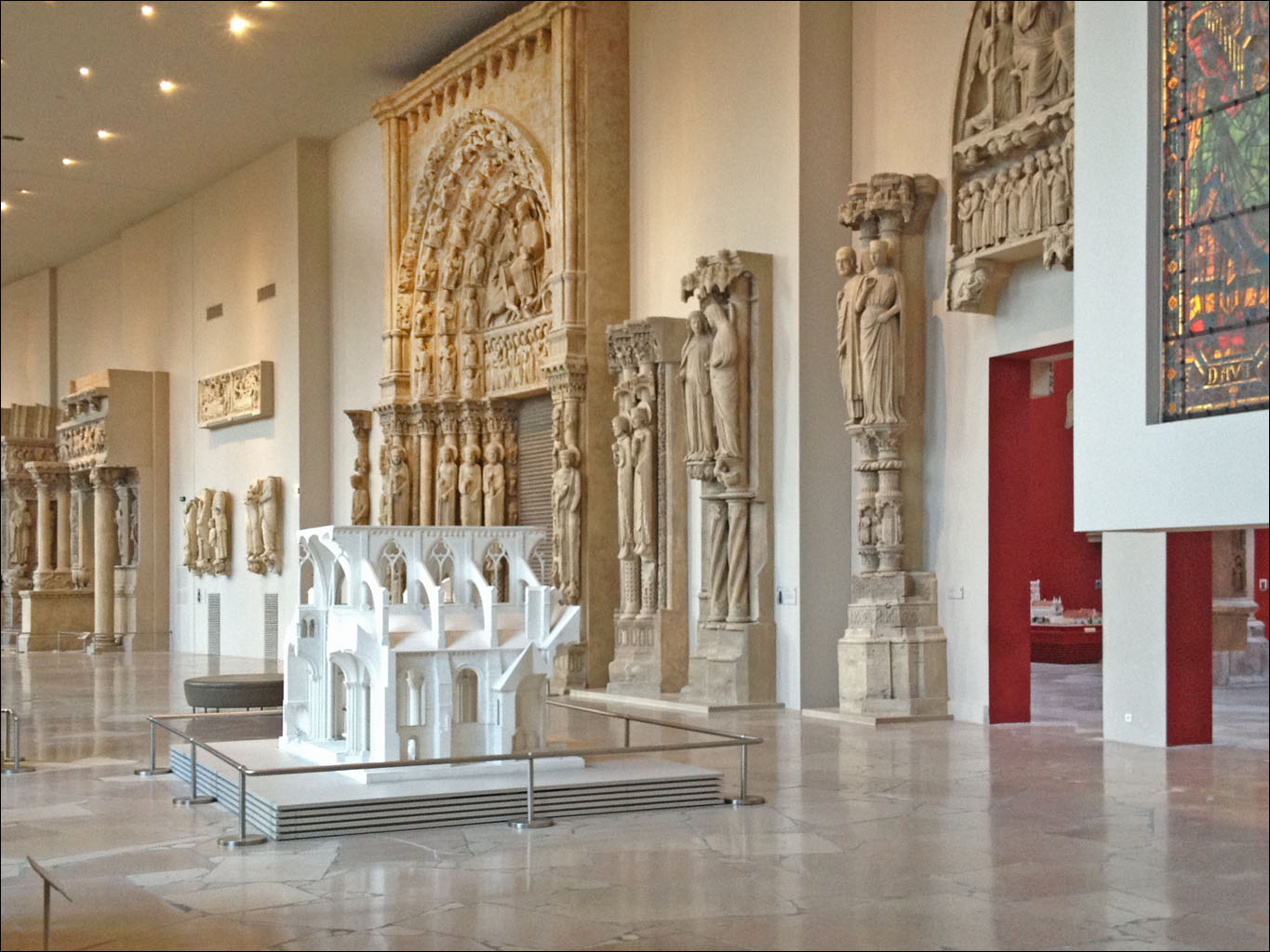 Au premier plan, maquette des dernières travées du choeur de la cathédrale Saint-Etienne à Sens (Yonne) Au centre, à l'arrière, portail central de la façade occidentale de la cathédrale Notre-Dame à Chartres (moulage).